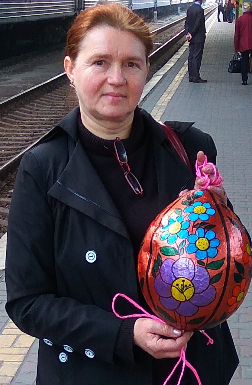 Антоніна Ісак-Дурда